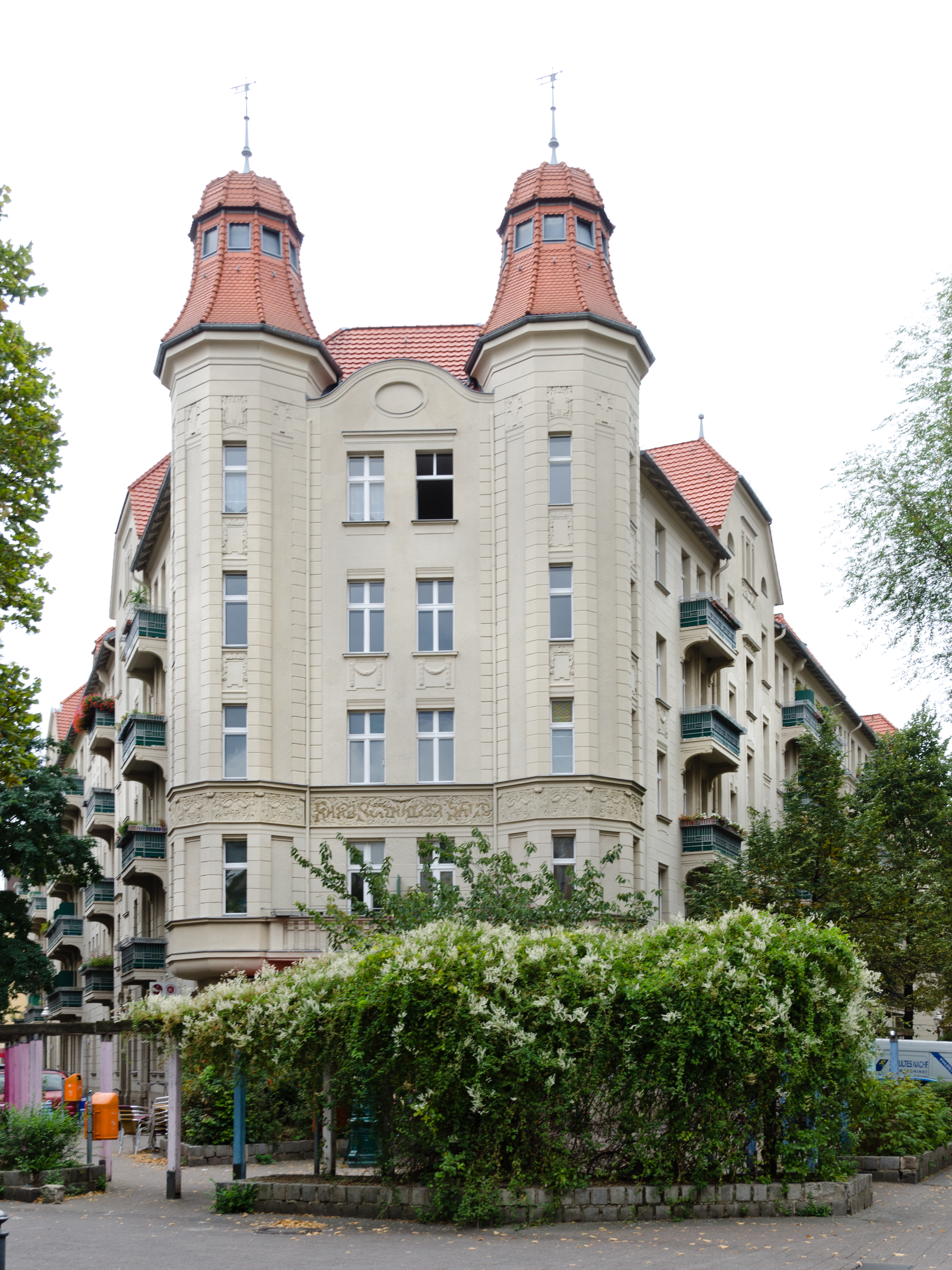 Malplaquetstraße 14–16B/Liebenwalder Straße 35–36A, Karl-Schrader-Haus, 1904–1906 von Kristeller und Sonnenthal